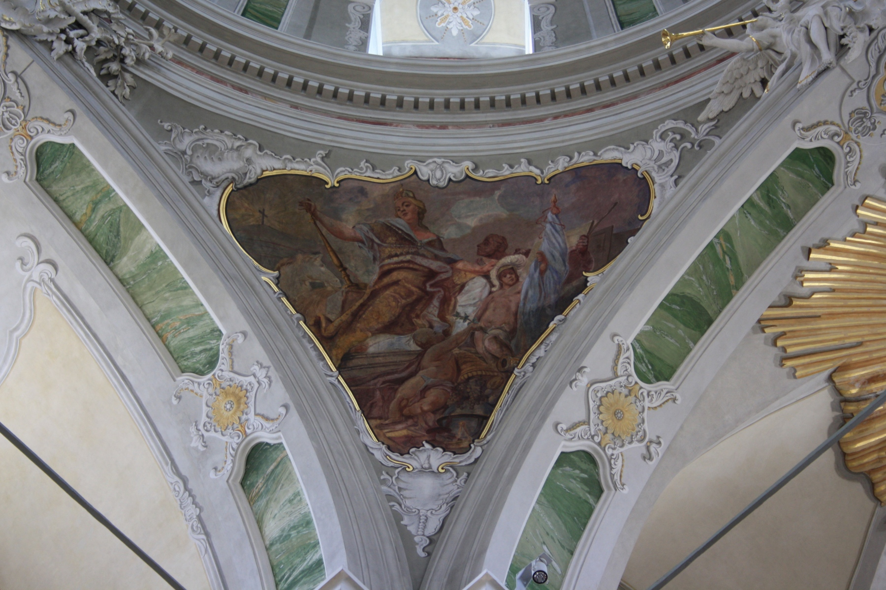 Zwickelbild